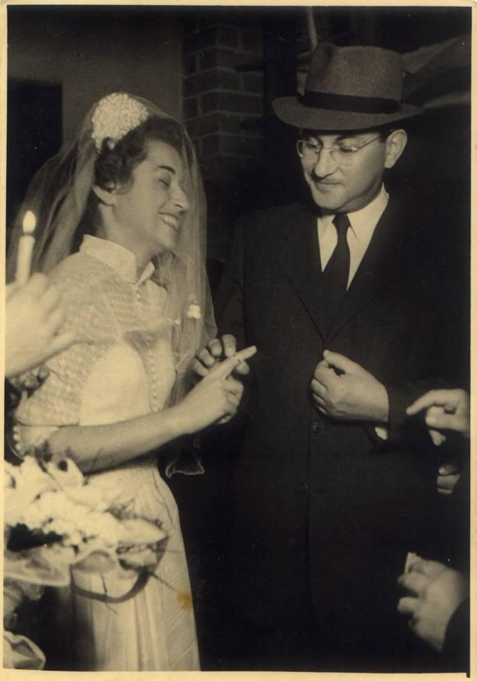 חתונת יצחק וניצה כץ 1952